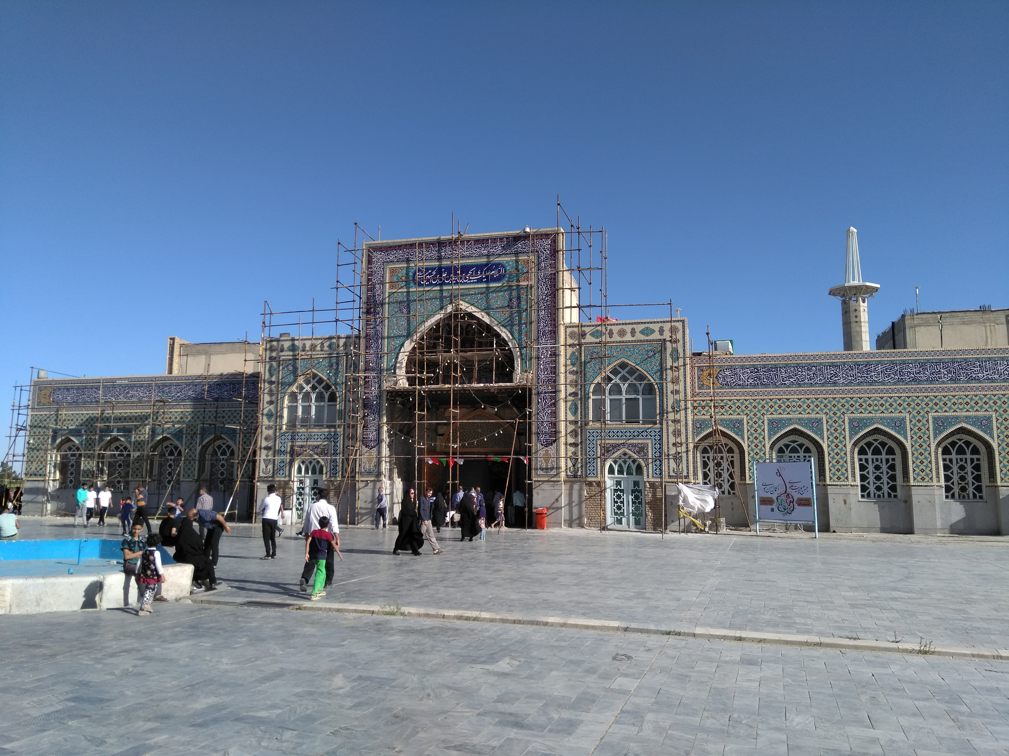 آرامگاه امامزاده یحیی بن زید در میامی، مشهد